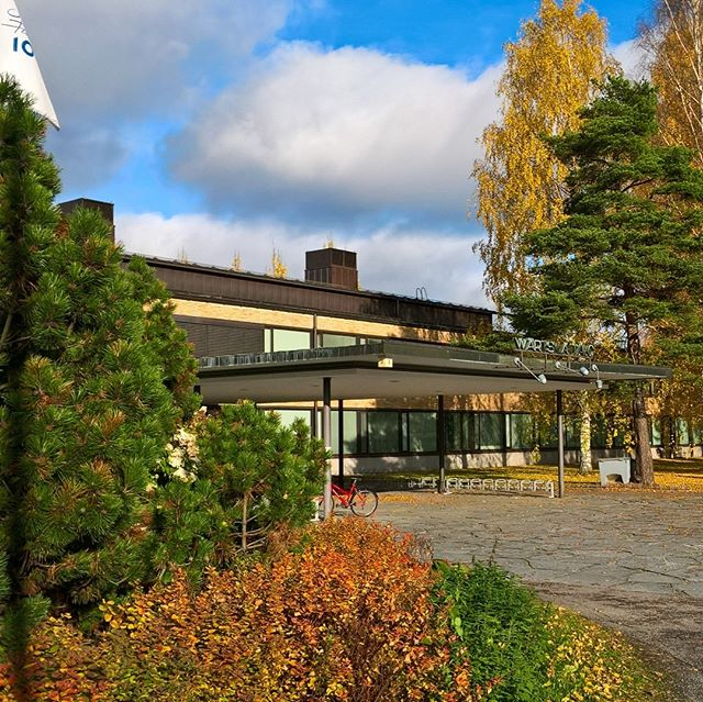 Karelia-ammattikorkeakoulun Wärtsilä-kampuksen/-talon pääsisäänkäynti lokakuisena alkuiltapäivänä 2017.